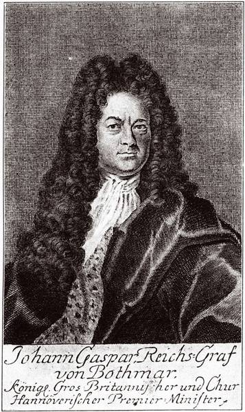 Stich: zeitgenössisches Portrait des hannoverschen Ministers Hans Caspar Bothmer (1656-1731)